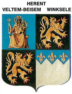 Wapenschild van herent